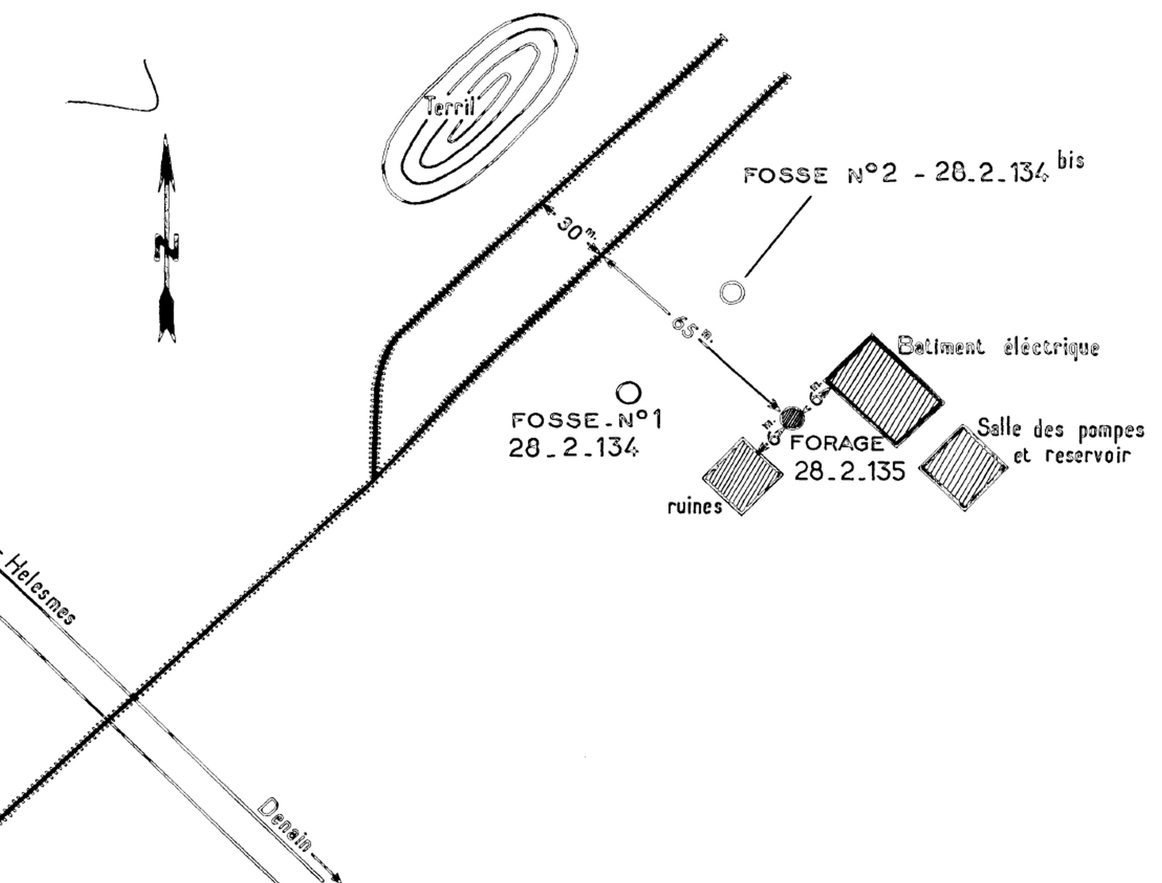 La fosse Lambrecht de la Compagnie des mines d'Anzin était un charbonnage constitué de deux puits situé à Wallers, Nord, Nord-Pas-de-Calais, France. Plan du carreau de fosse après la destruction des chevalements.